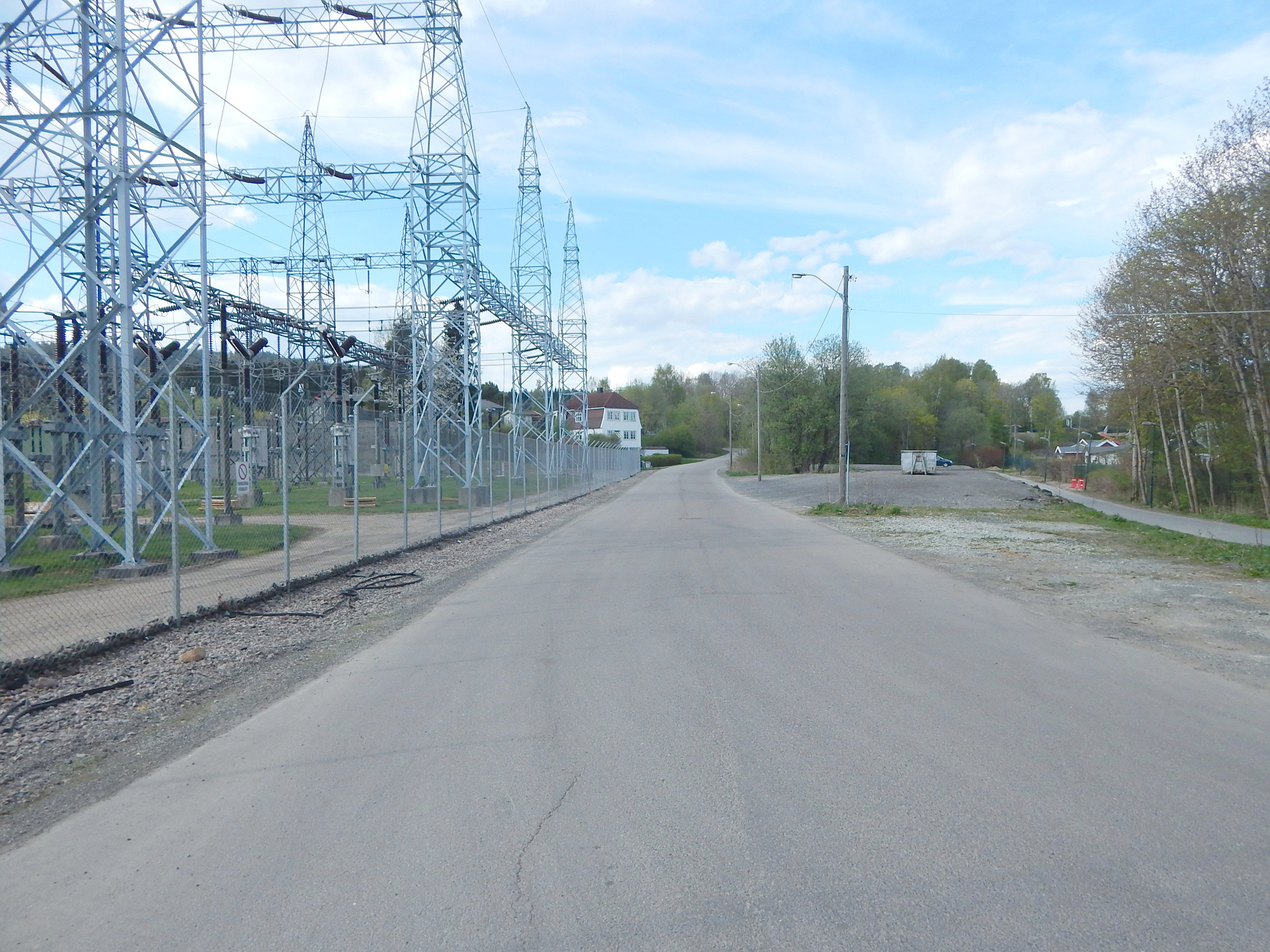 Gaustadveien ved Sogn transformatorstasjon